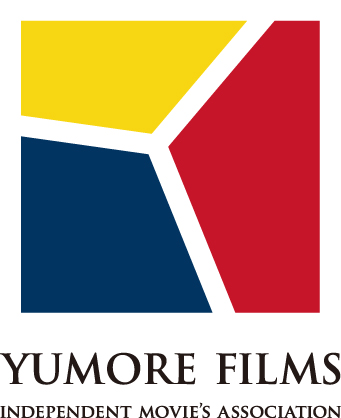 映画制作団体YUMORE FiLMsのロゴです。